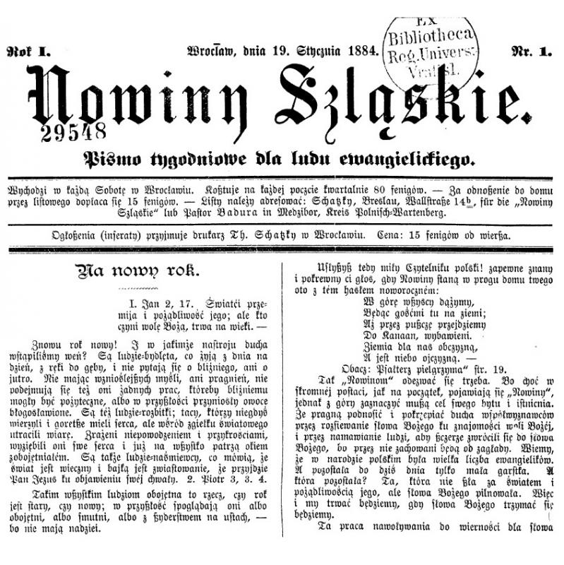 "Nowiny Szląskie", Wrocław 1884-1888.